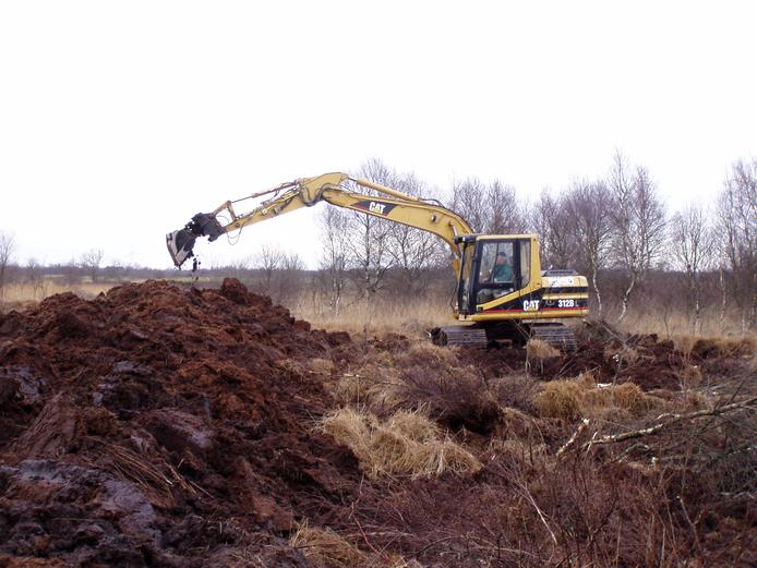 Baggereinsatz im Naturschutzgebiet: Zu beachten ist, dass die Baggertrasse im Sumpfgebiet befahrbar ist. Aufnahme aus dem Königsmoor (Teil des NSG „Hahnenknooper Moore“) im Landkreis Cuxhaven, Niedersachsen.